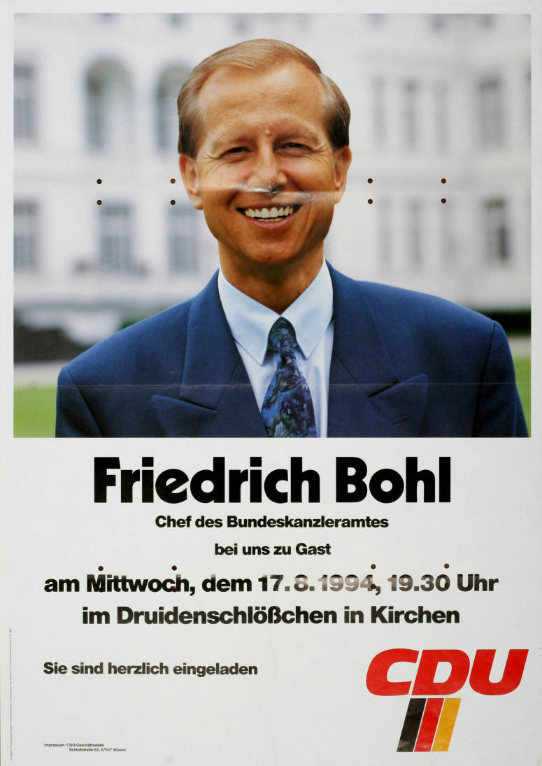 Friedrich Bohl Chef des Bundeskanzleramtes bei uns zu Gast ... CDU Abbildung: Porträtfoto Plakatart: Ankündigungsplakat Auftraggeber: CDU-Bundesgeschäftsstelle, Hauptabteilung Öffentlichkeitsarbeit, Konrad-Adenauer-Haus, Bonn Drucker_Druckart_Druckort: Greven & Bechtold GmbH, Hürth Objekt-Signatur: 10-001 : 4060 Bestand: Plakate zu Bundestagswahlen (10-001) GliederungBestand10-18: Plakate zu Bundestagswahlen (10-001) » Die 13. Bundestagswahl am 16. Oktober 1994 » CDU » Ankündigungsplakate Lizenz: KAS/ACDP 10-001 : 4060 CC-BY-SA 3.0 DE